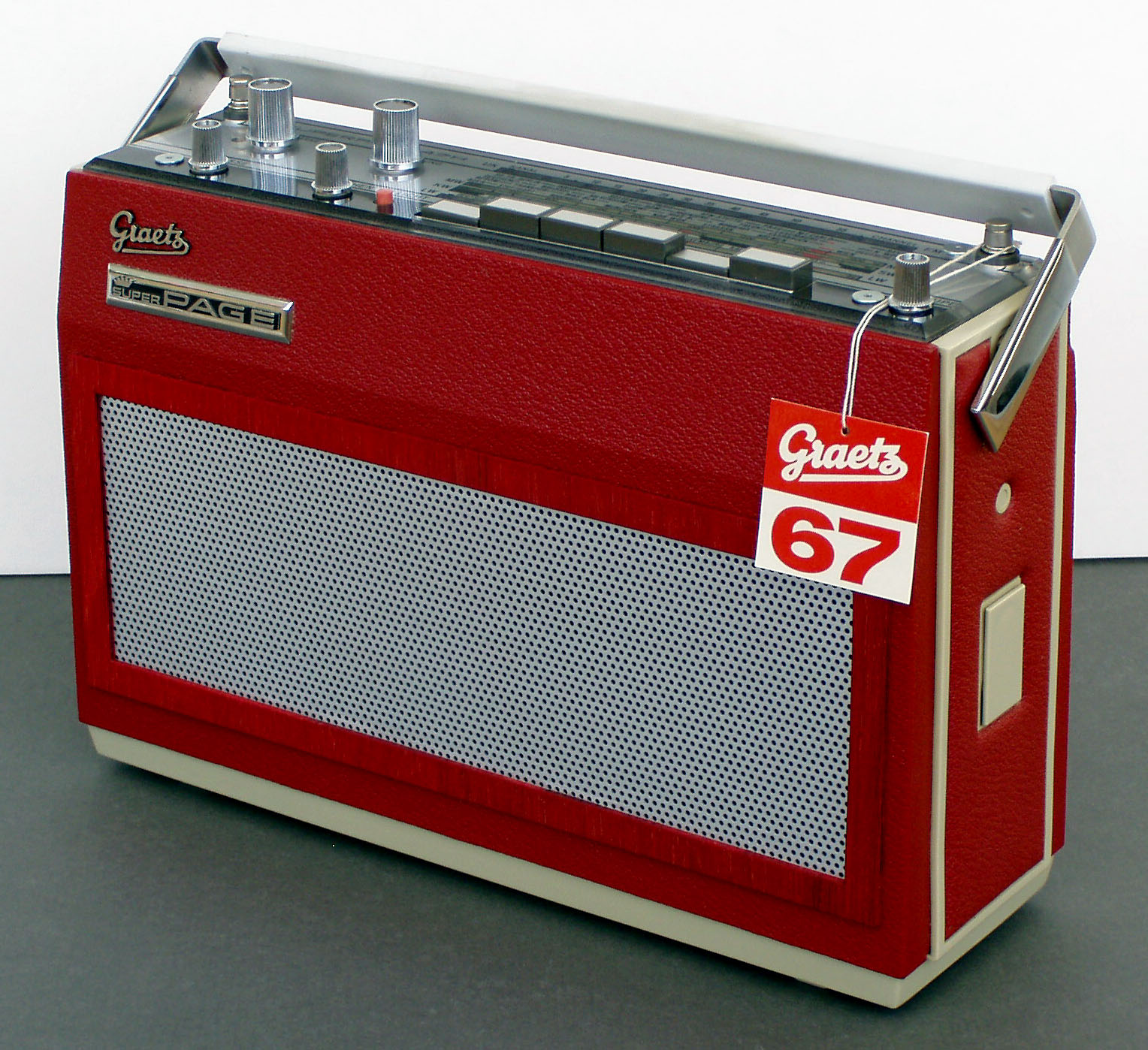 Spitzen-Kofferradio SUPERPAGE der deutschen Elektronikfirma Graetz/SEL von 1967